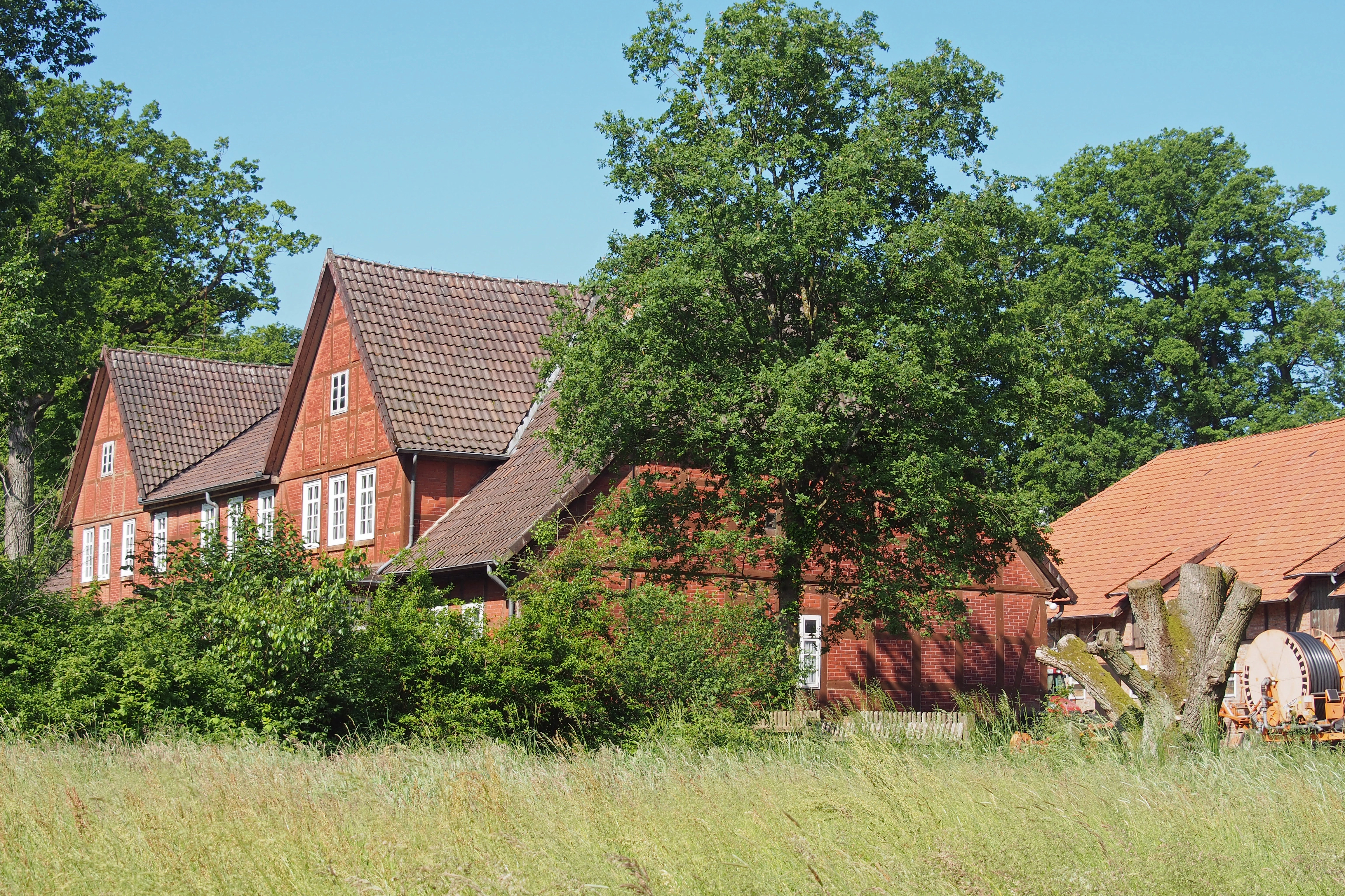 Bauernhof Starkshorn Nr. 2, Eschede